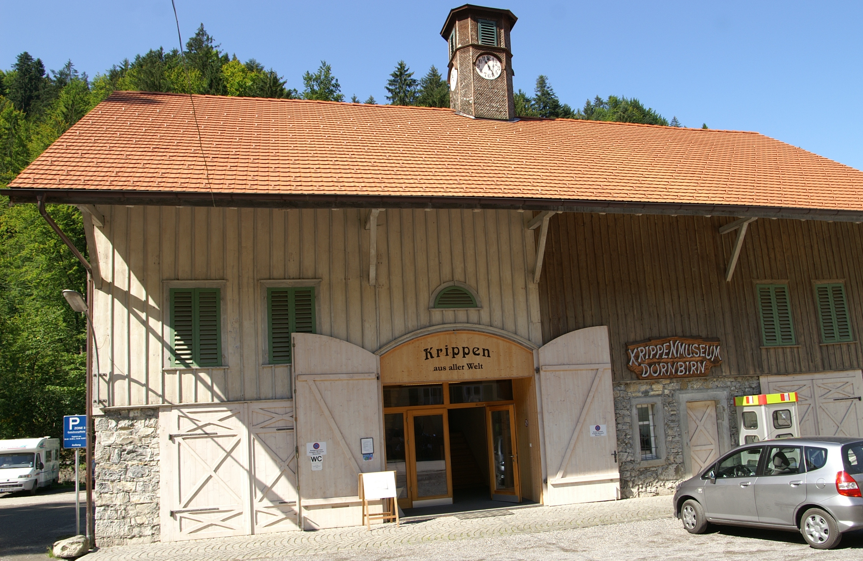 Krippenmuseum im Gütle, Dornbirn, Vorarlberg